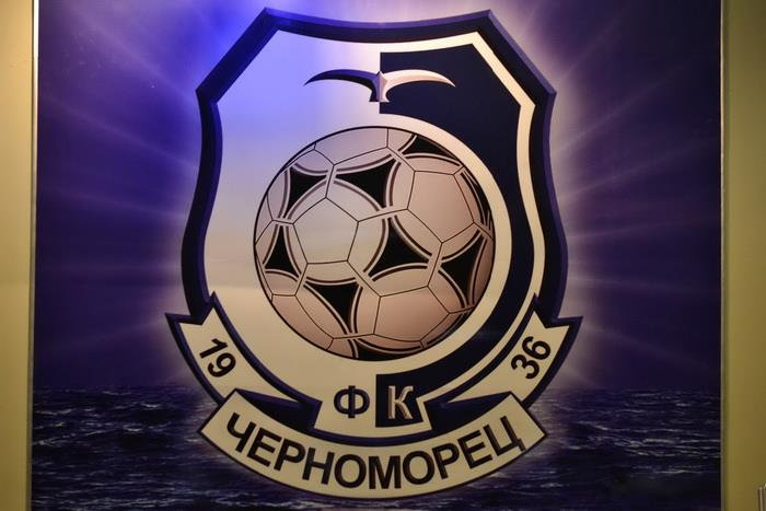 Емблема одеського Чорноморця на домашньому стадіоні.